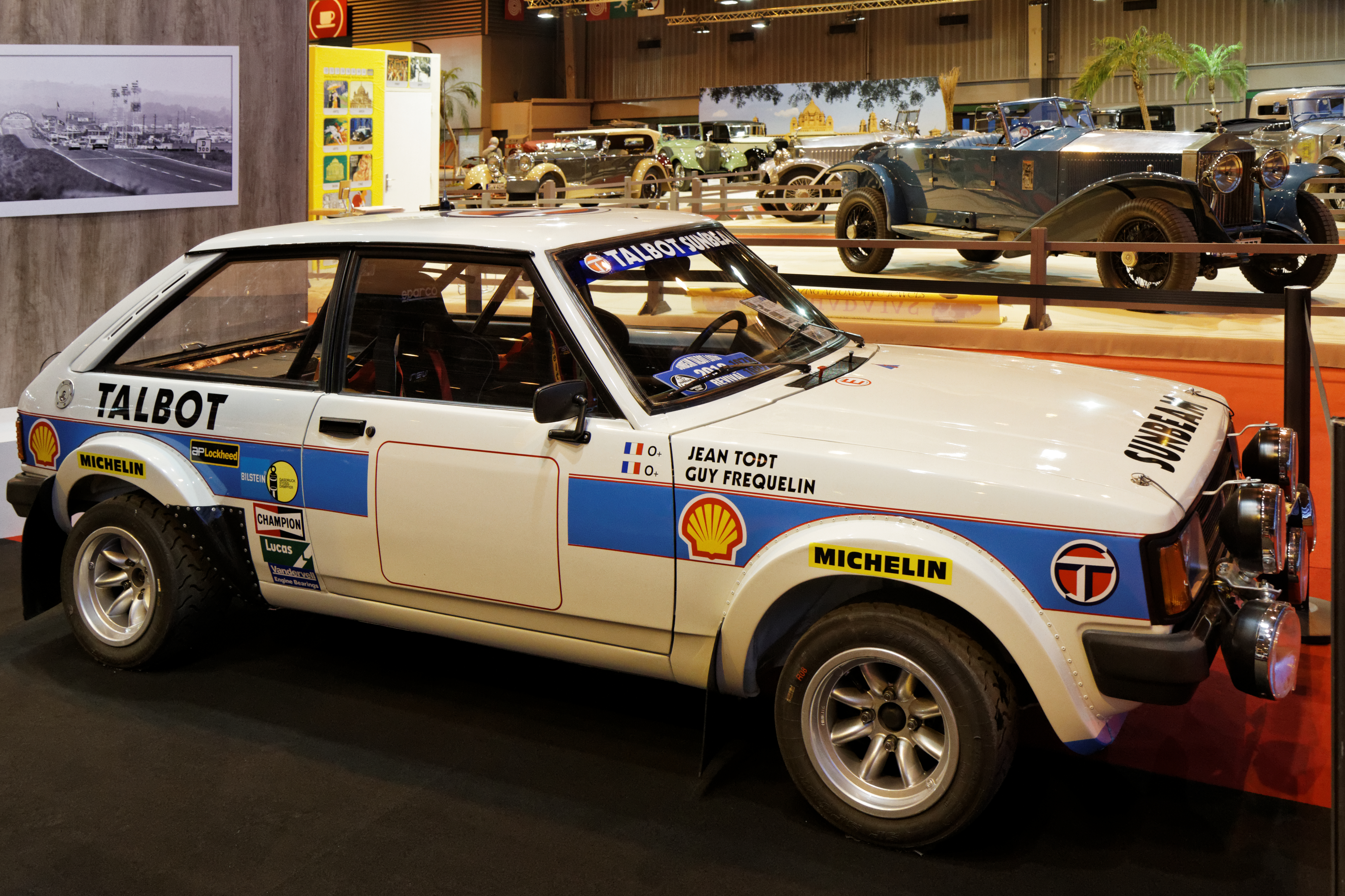 La Talbot KDU 111 V exposée lors du salon Retromobile 2014